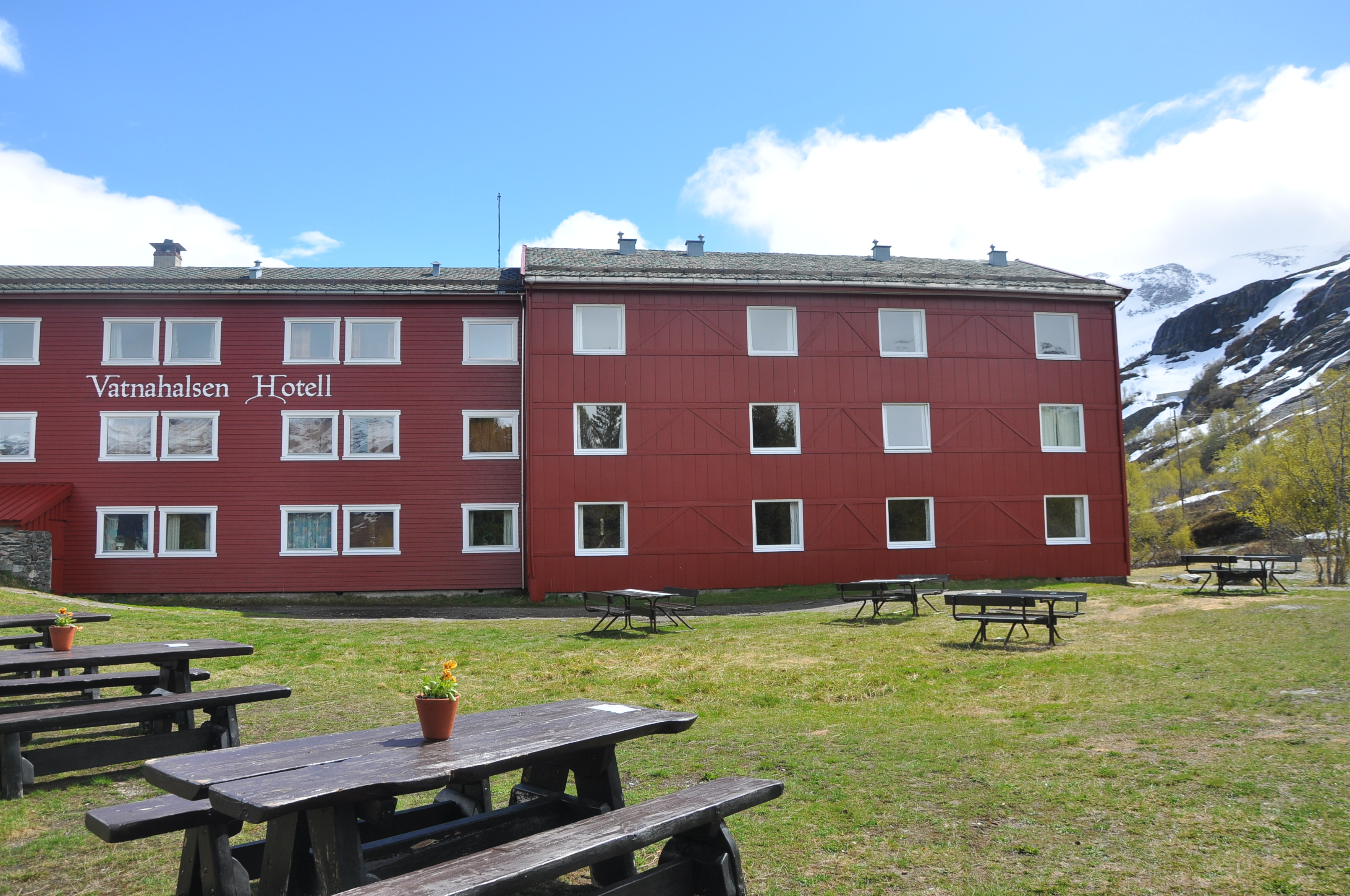 Vatnahalsen høgfjellshotell